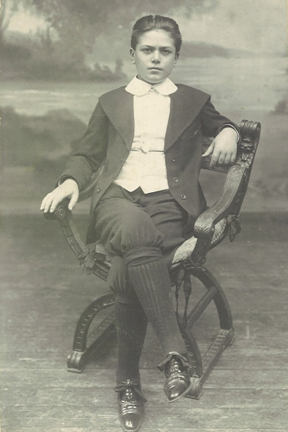 Il pianista forlivese Nino Rossi agli esordi nel 1908